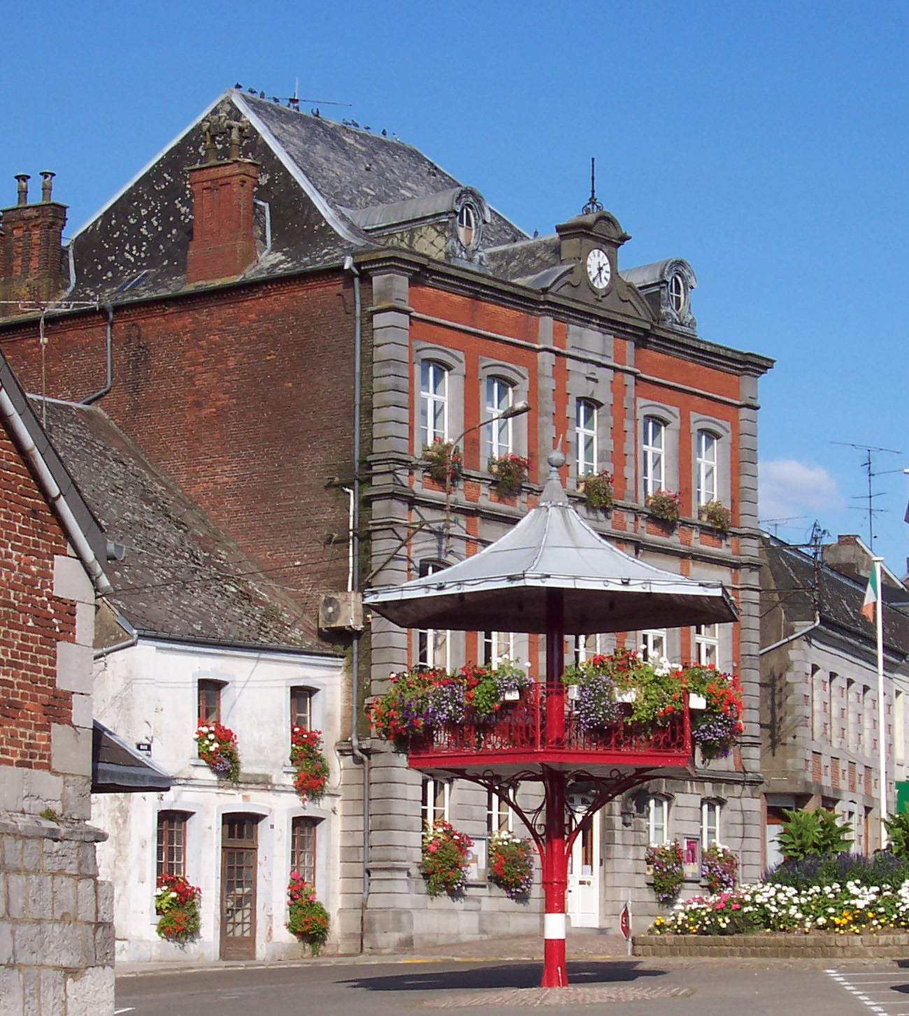 AU PREMIER PLAN LE KIOSQUE A MUSICIENS ET AU SECOND PLAN LA MAIRIE